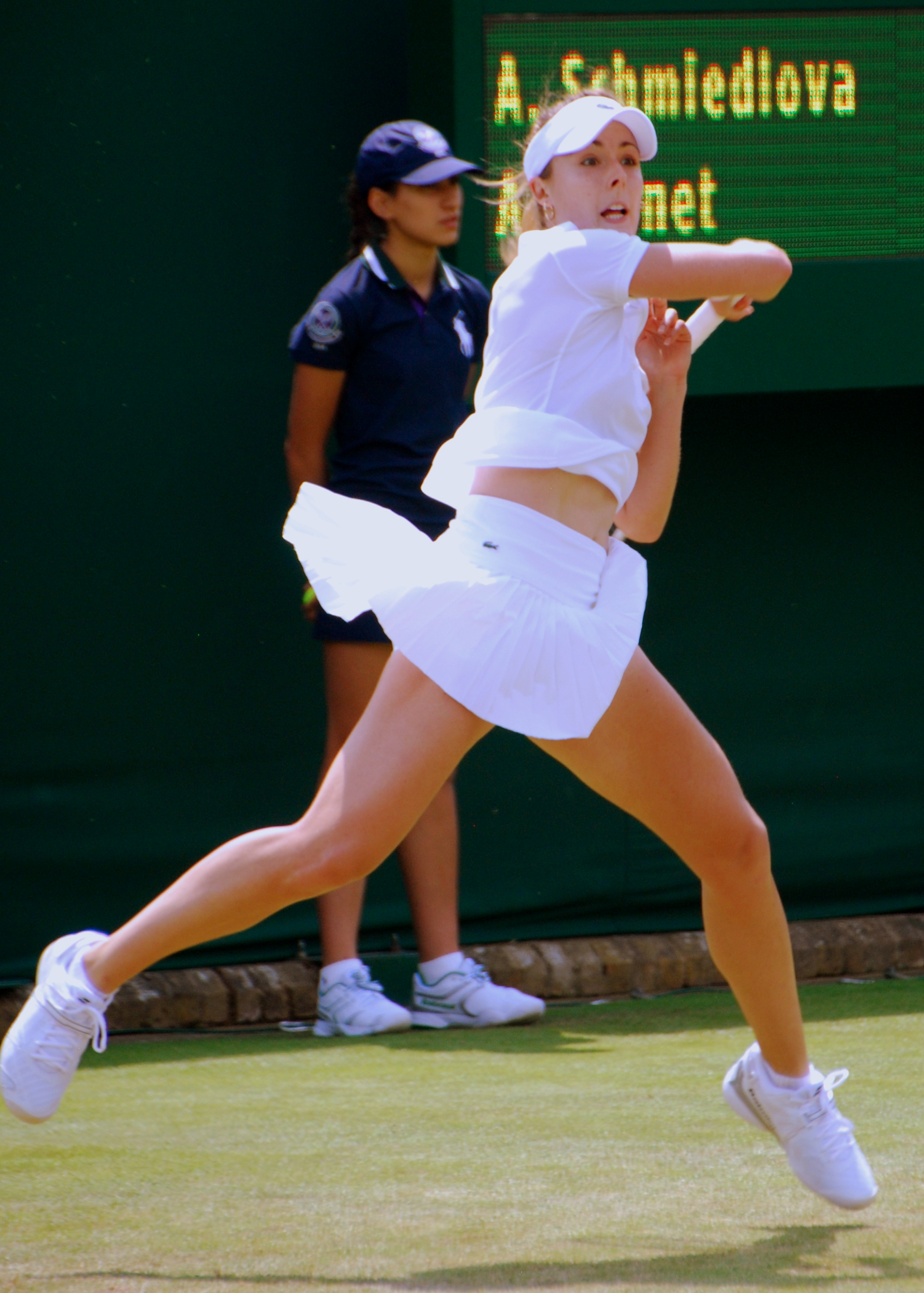 Alize Cornet